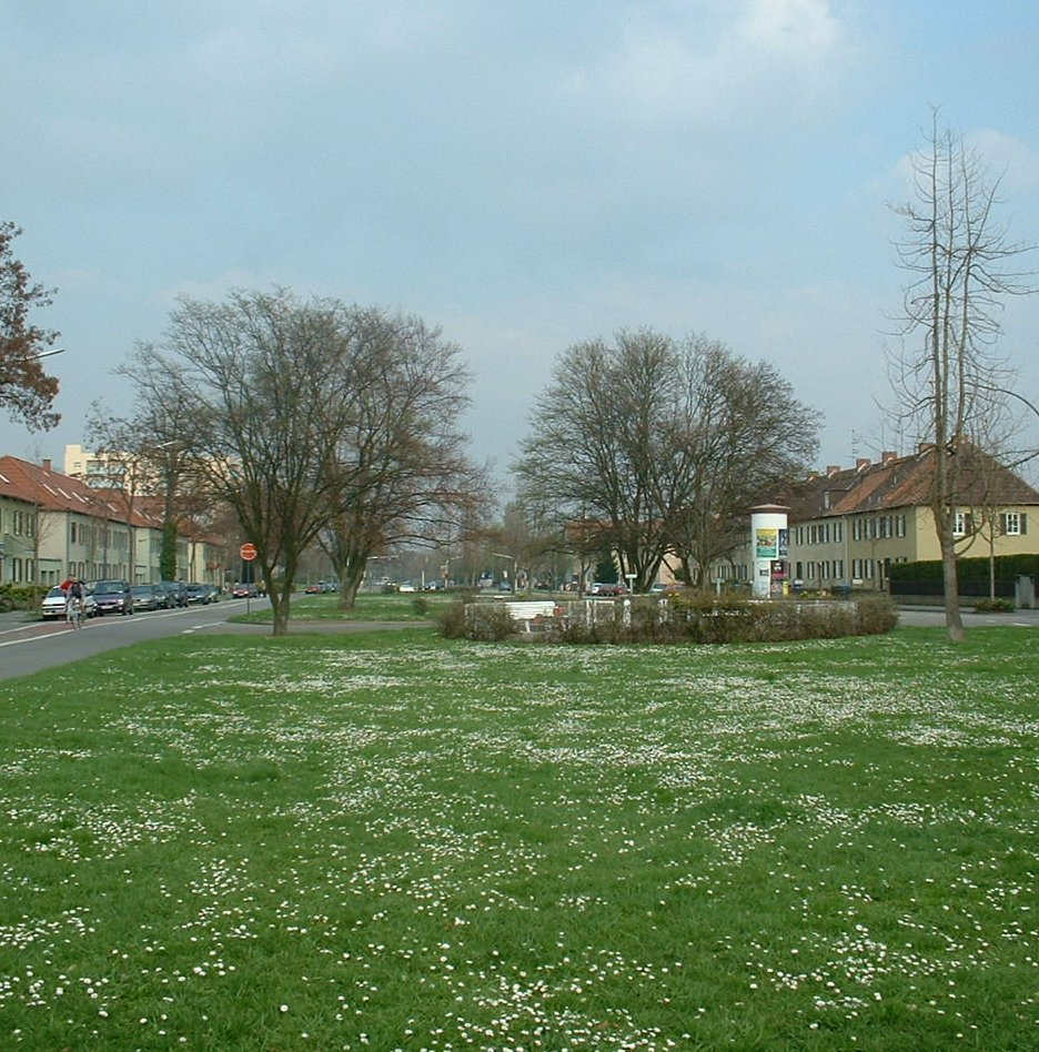 Die nach Fritz Raschig benannte Raschigstraße, der Kern der Gartenstadt von Ludwigshafen am Rhein im April 2005 (für die GNU FDL)